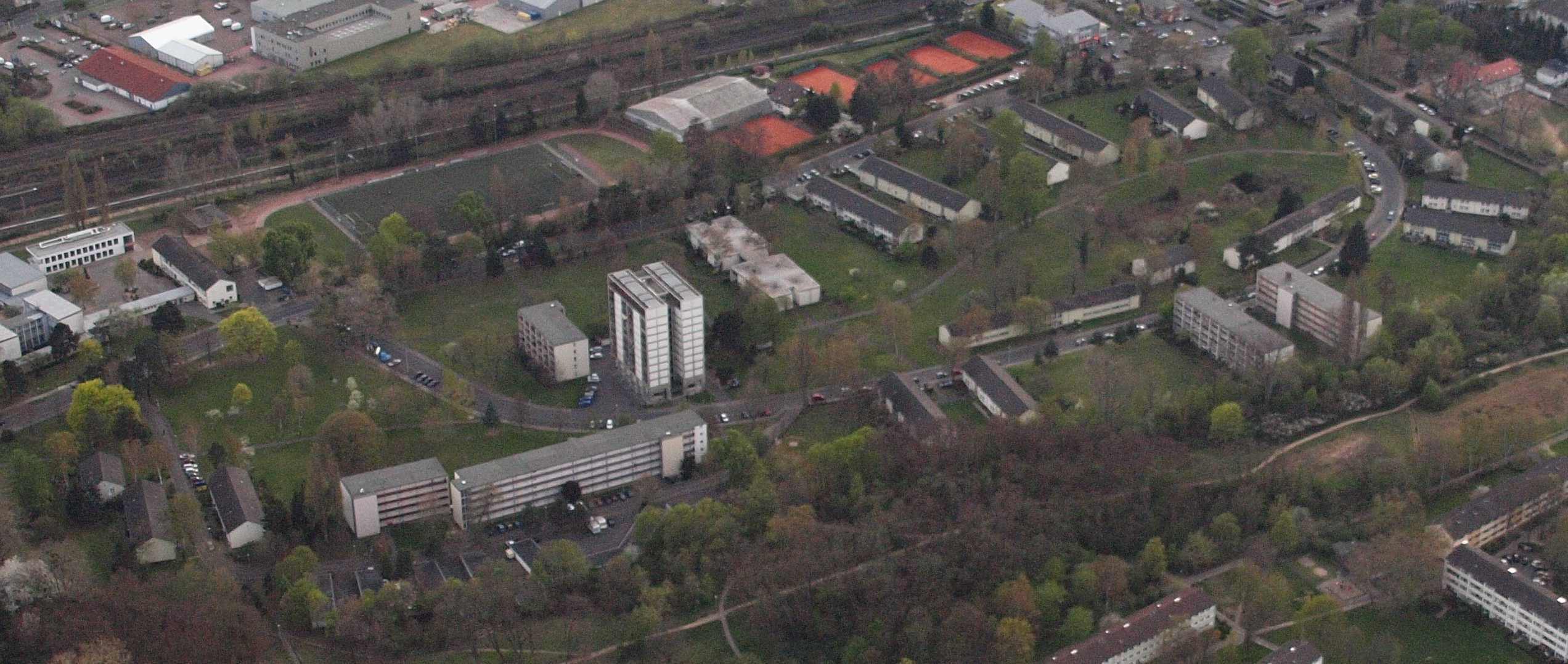 HICOG-Siedlung Tannenbusch: Luftaufnahme